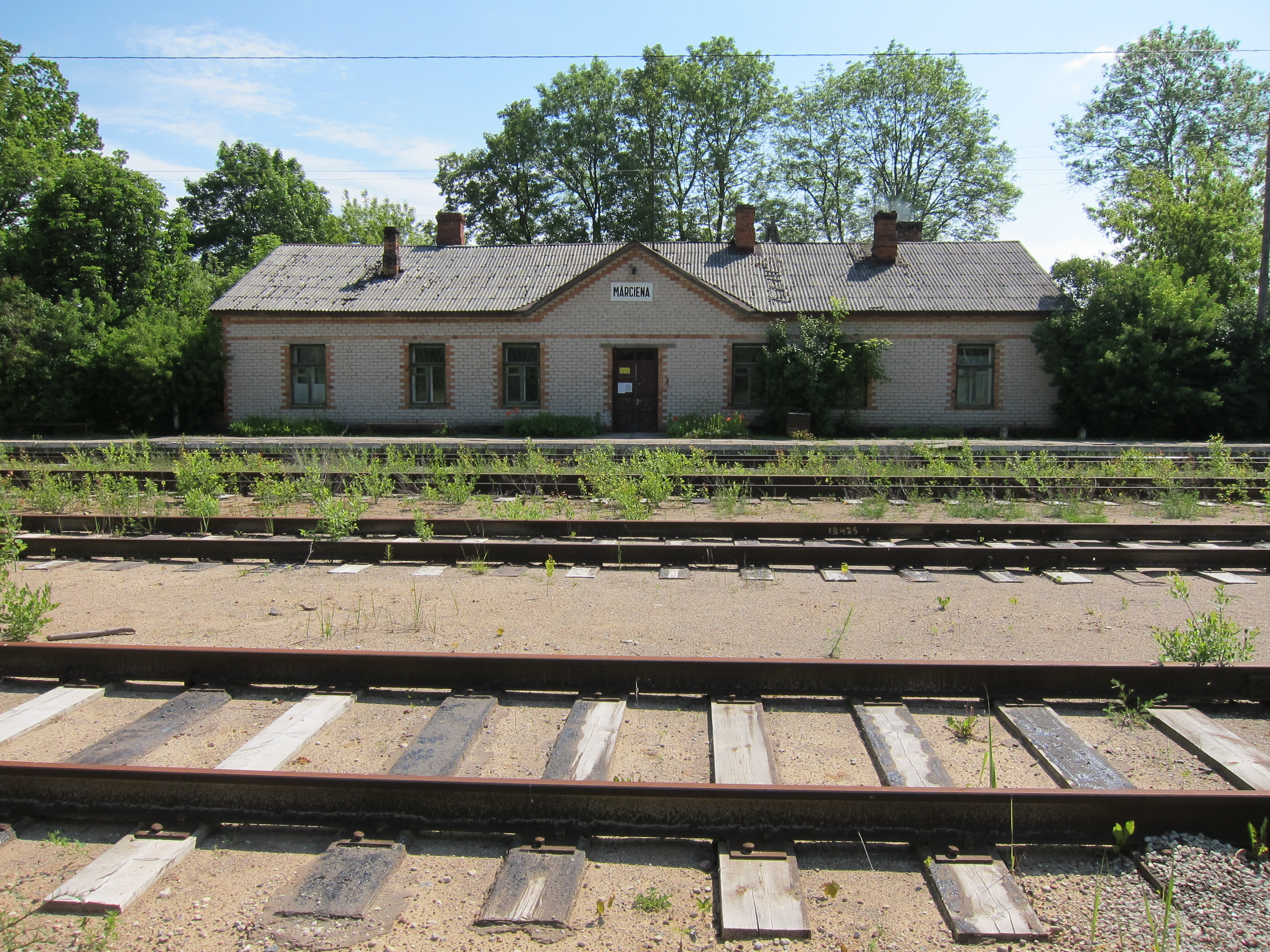 Mārcienas stacijas ēka un sliežu ceļi.